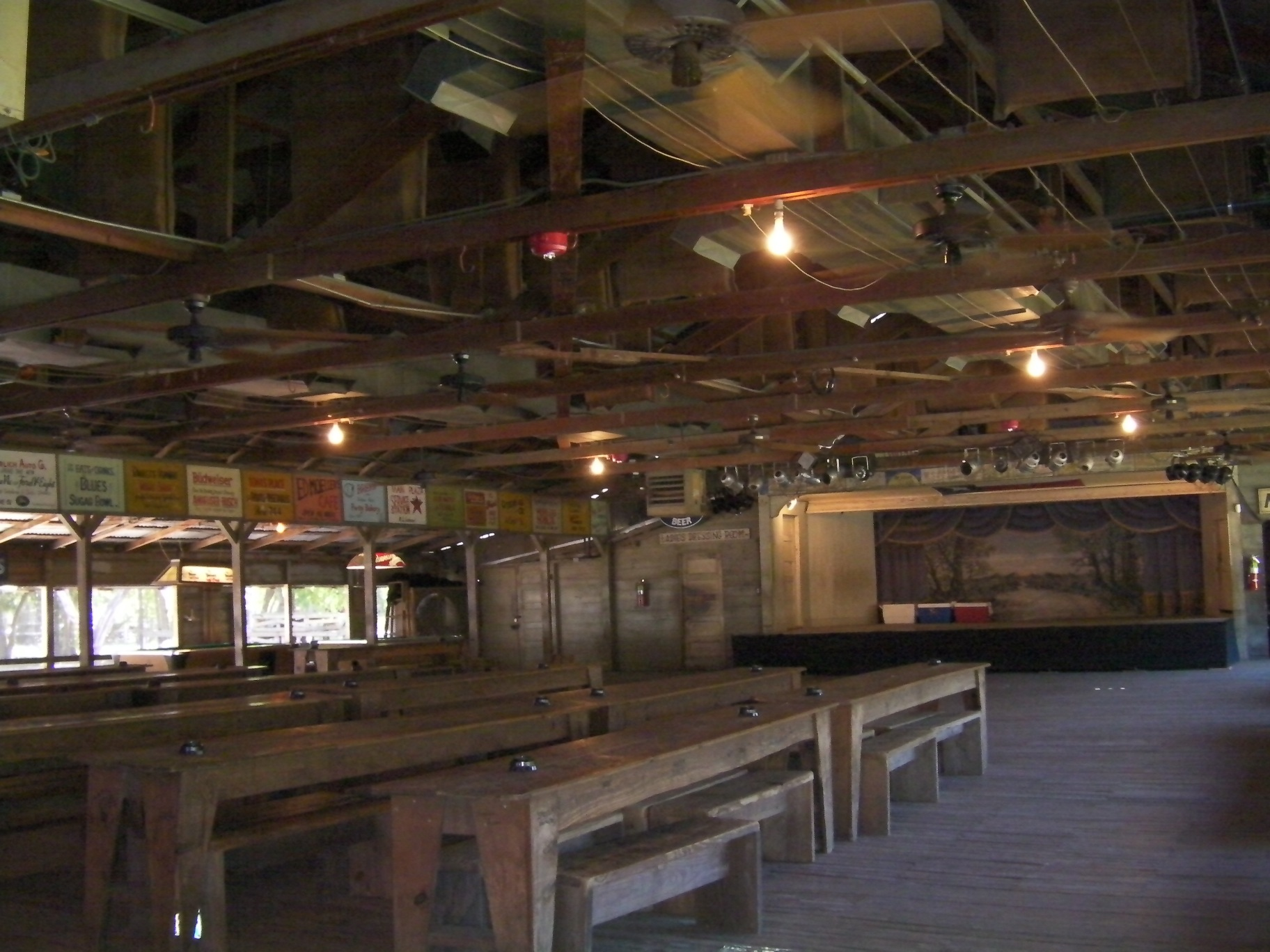 Blick in die Gruene Hall, Tanzhalle seit 1878